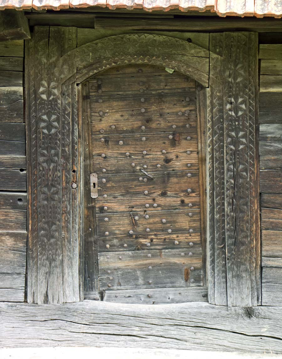 Biserica de lemn din Totoreni, portalul de la intrare.